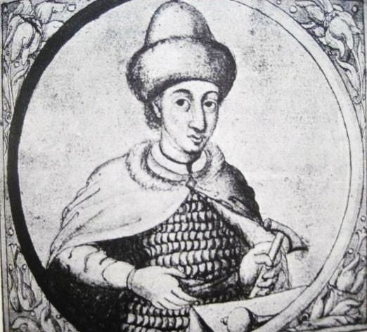 Юрась Хмельницький